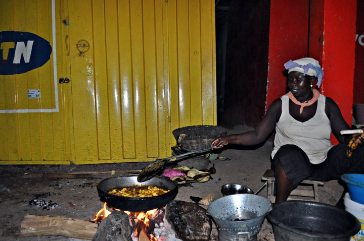 Kelewele Seller in Takoradi